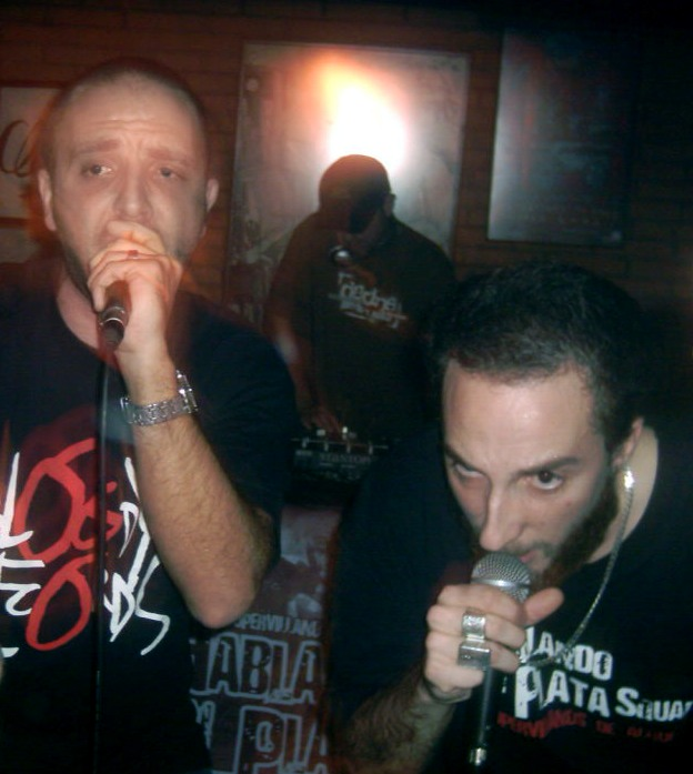 Varios componentes del grupo de HipHop español "Hablando en Plata"